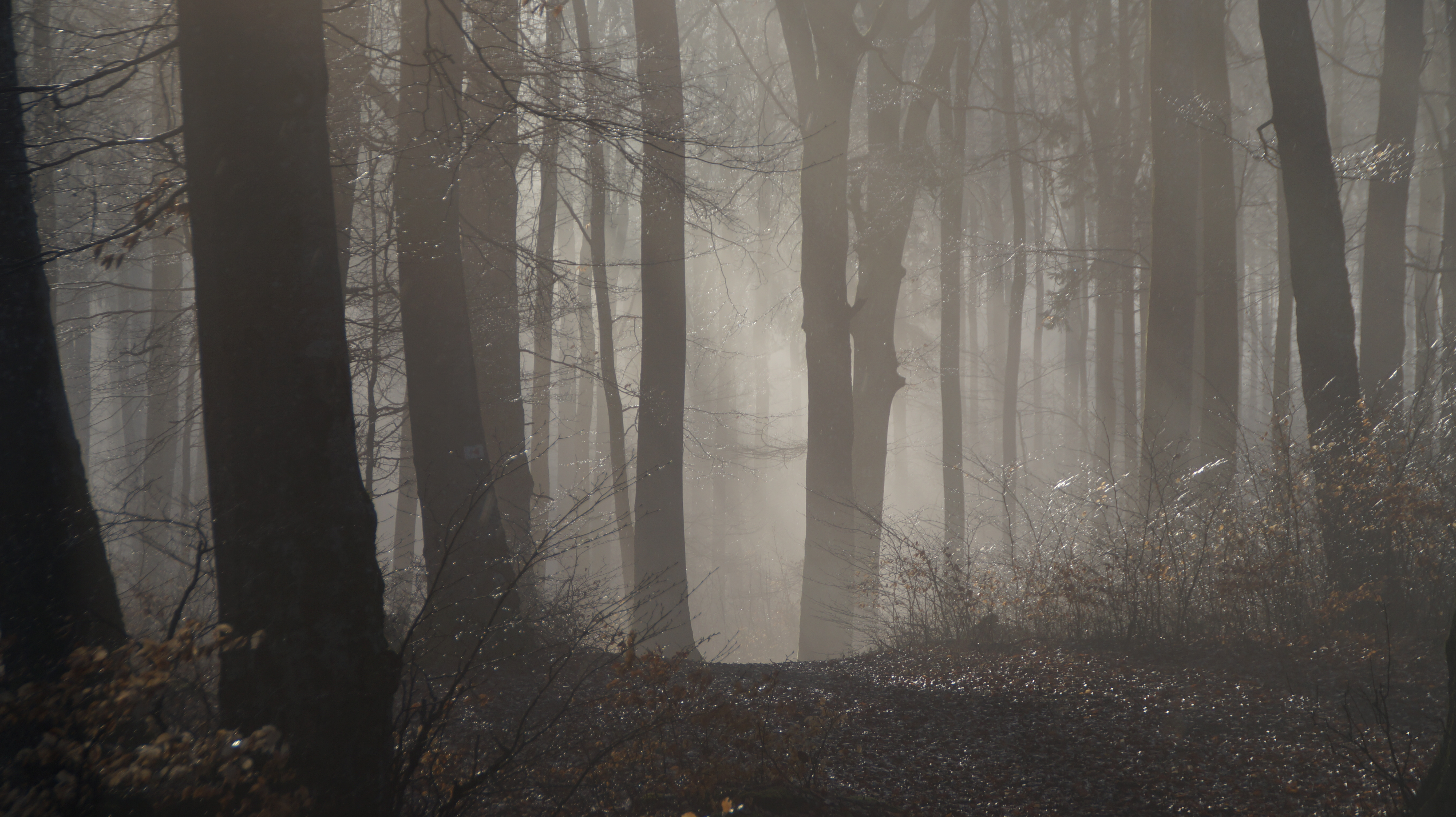 morgendlicher Nebel im Wald, am Aalbäumle, Aalen, Ostalbkreis